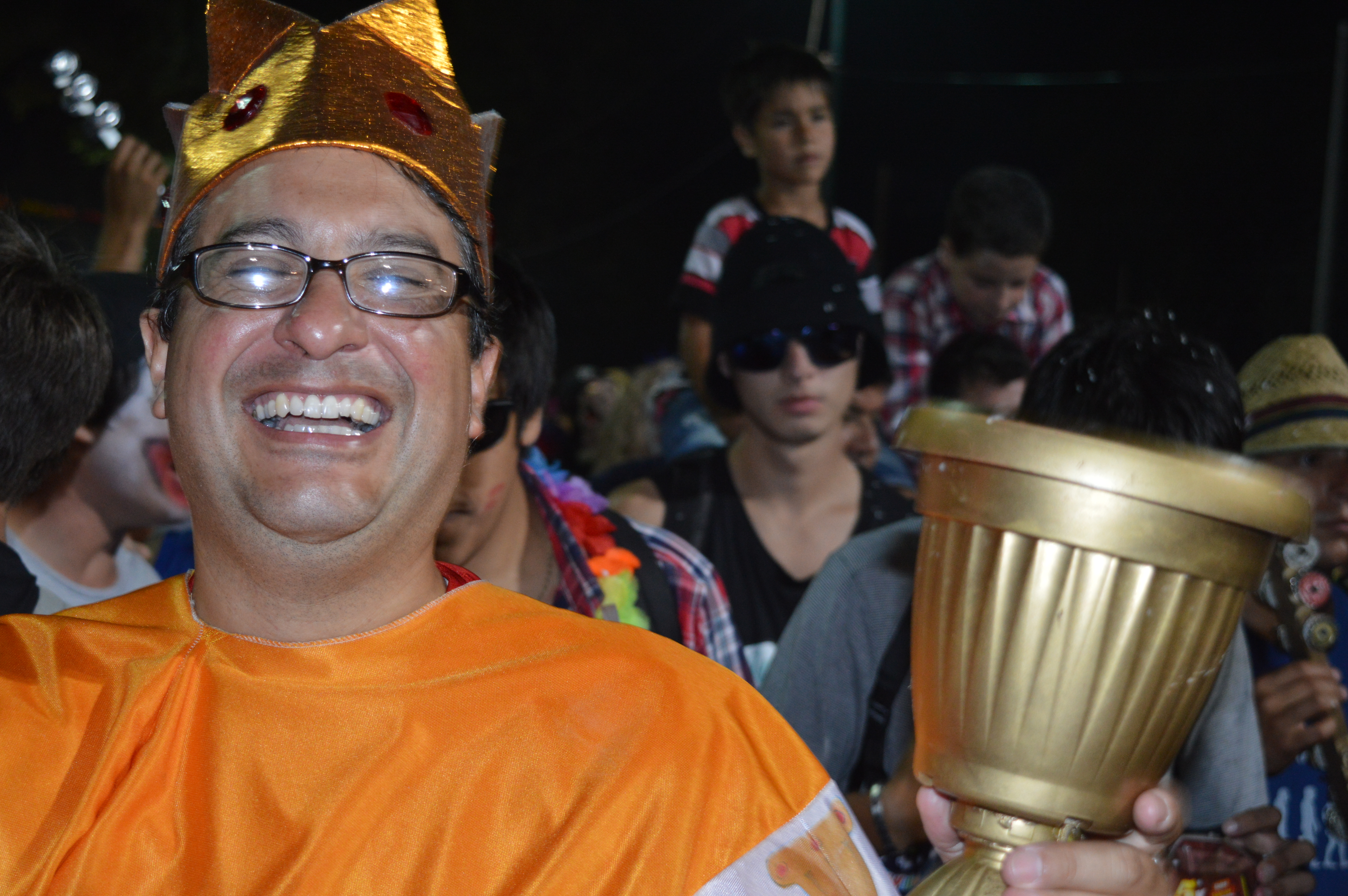 Los integrantes de Terror do Corso se disfrazan de lo que quieren sin tener que respetar una temática.